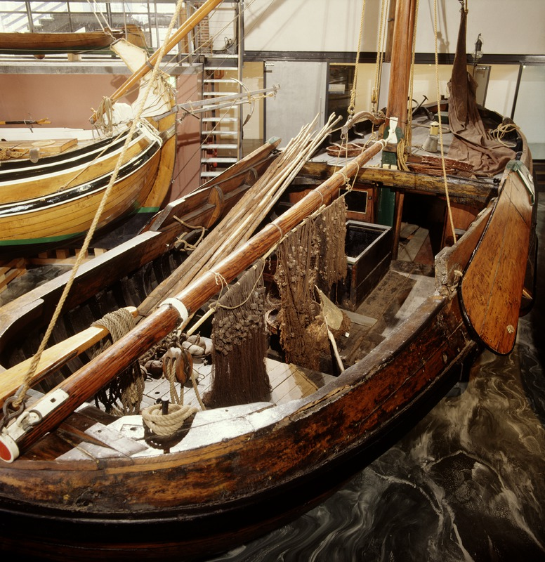 vollenhovense bol